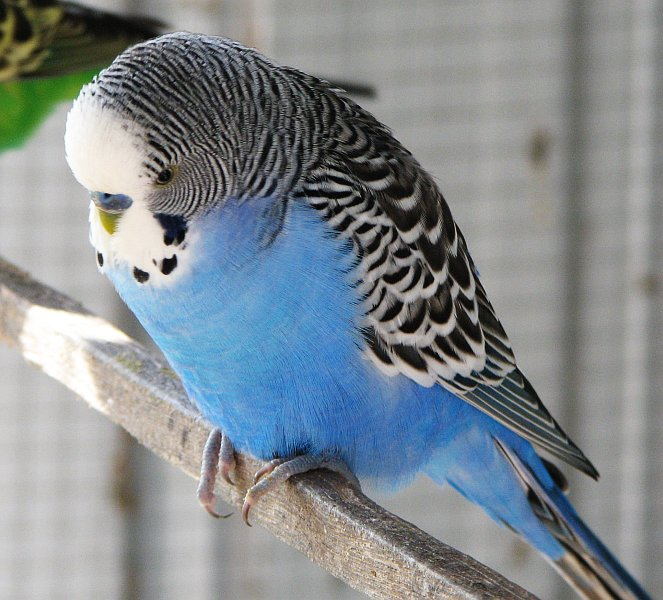 Blue Male Budgerigar